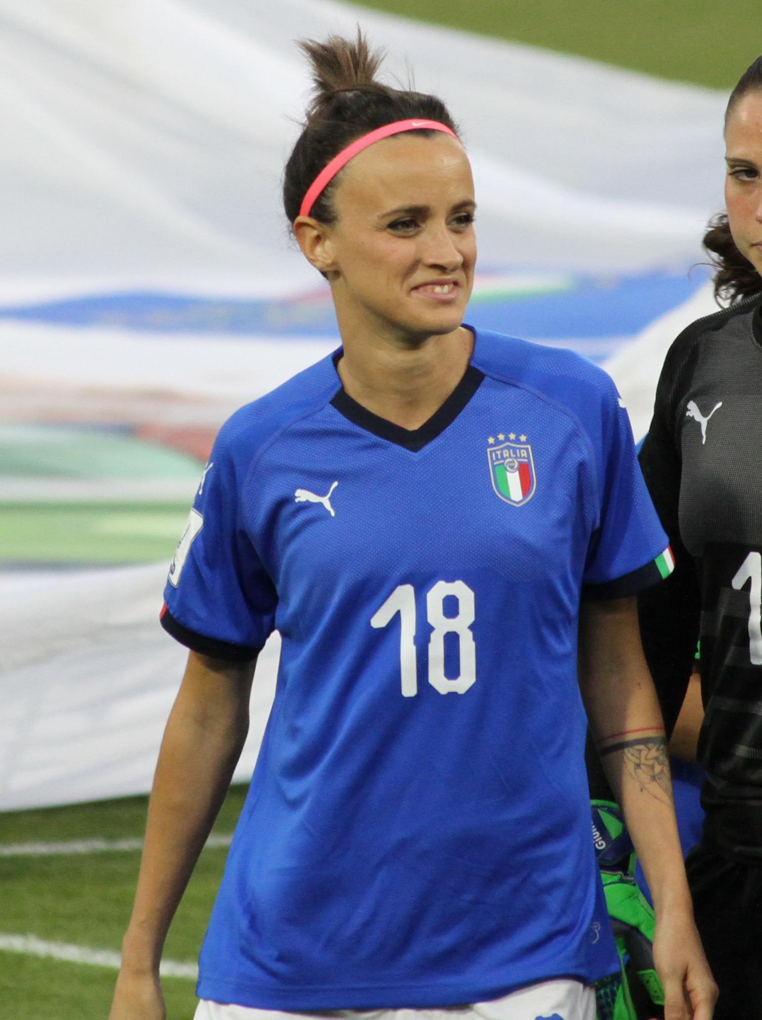 Ferrara, 10 aprile 2018: Italia vs Belgio, qualificazioni al Mondiale di Francia 2019